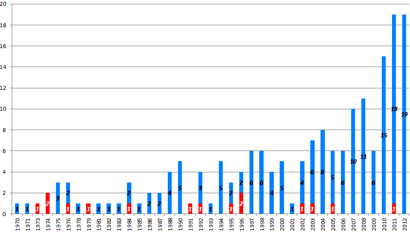 Nombre de lancements spatiaux par la République populaire de Chine entre 1970 et 2012. Le premier tir d'essai d'un lanceur en 1969 qui fut une échec n'est pas indiqué. Les années après 1970 qui ne sont pas indiquées n'ont vu aucune tentative de tir. Bleu : Succès Rouge : Échec